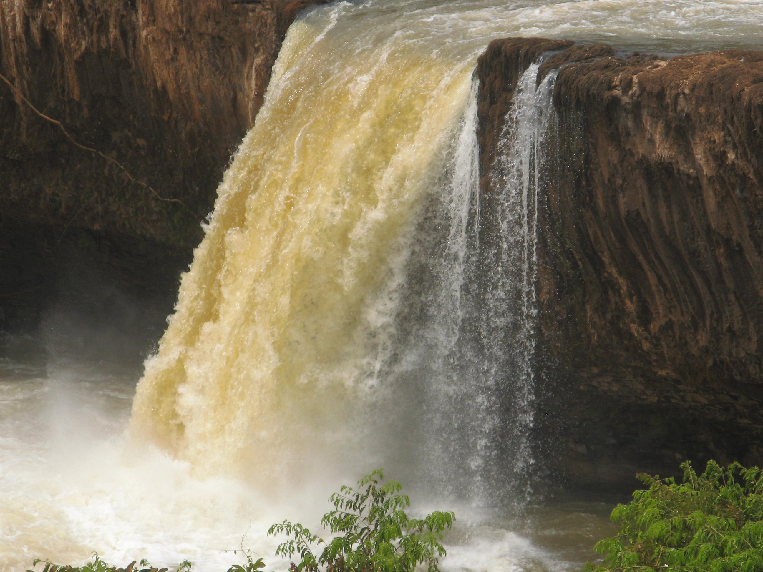 Chutes de Vine situé dans la région de l’Adamaoua